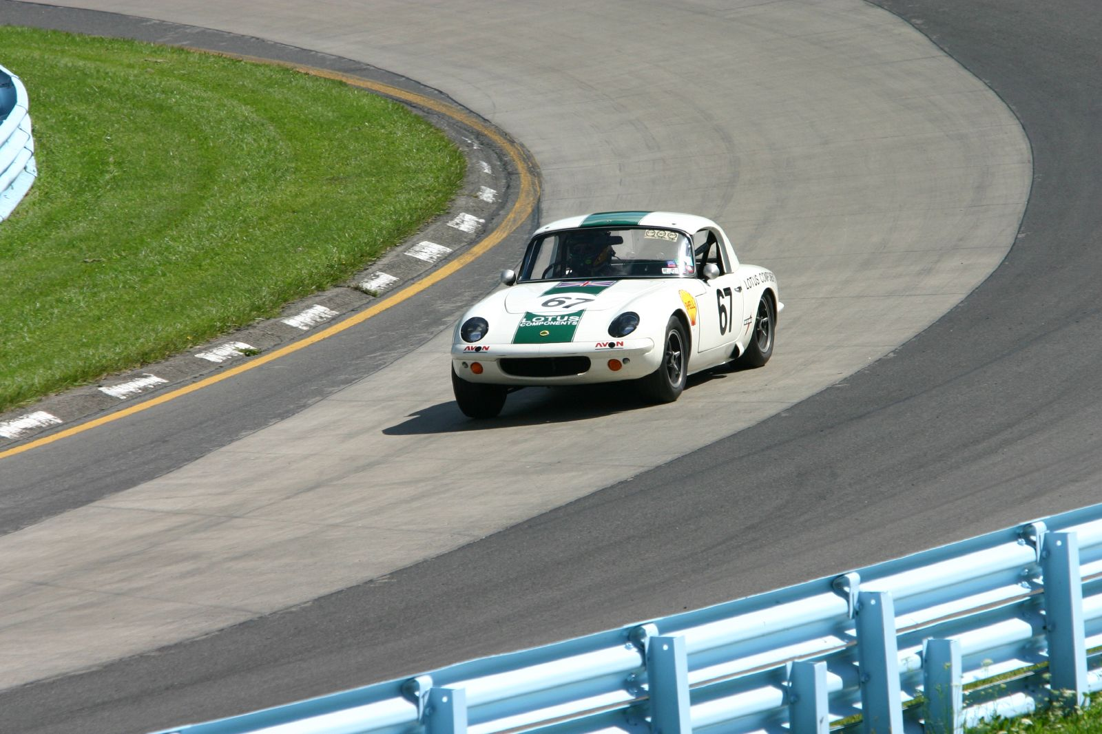 67 - 1965 Lotus Elan 26R (1558cc) Mike Taradash Palos Verdes, CA